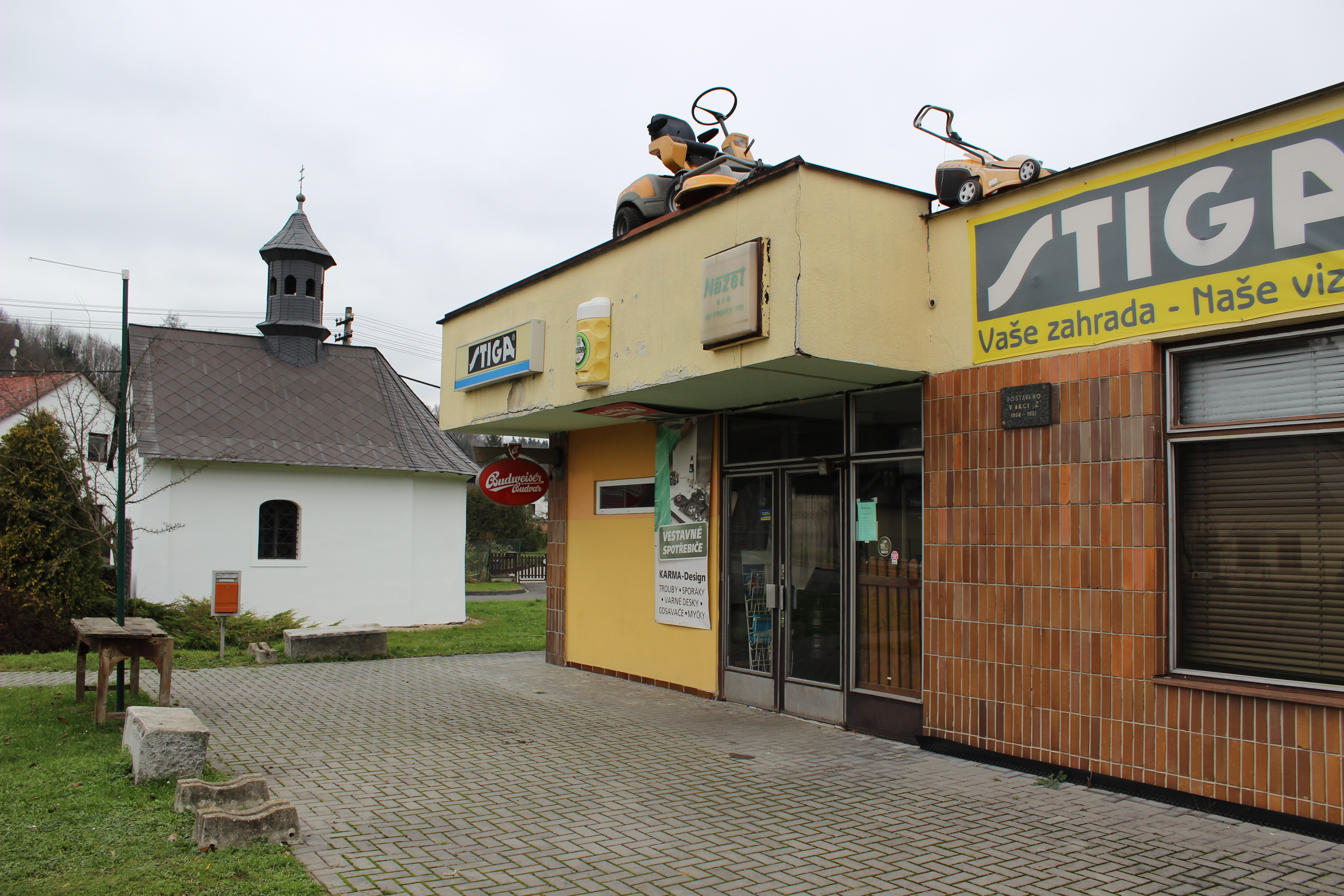 Objekt ve Vikýřovicích postavený v Akci Z.